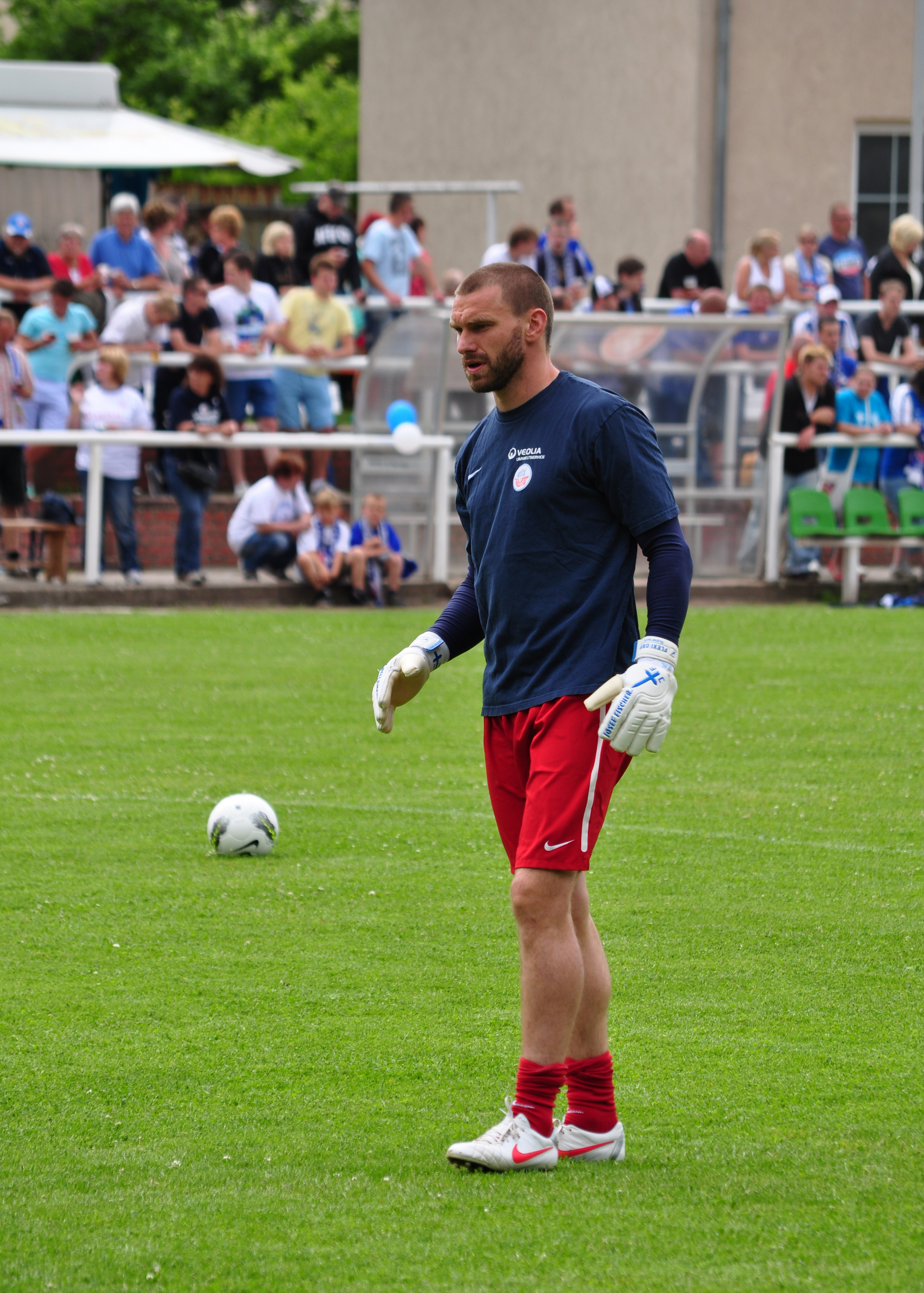 Jörg Hahnel 2